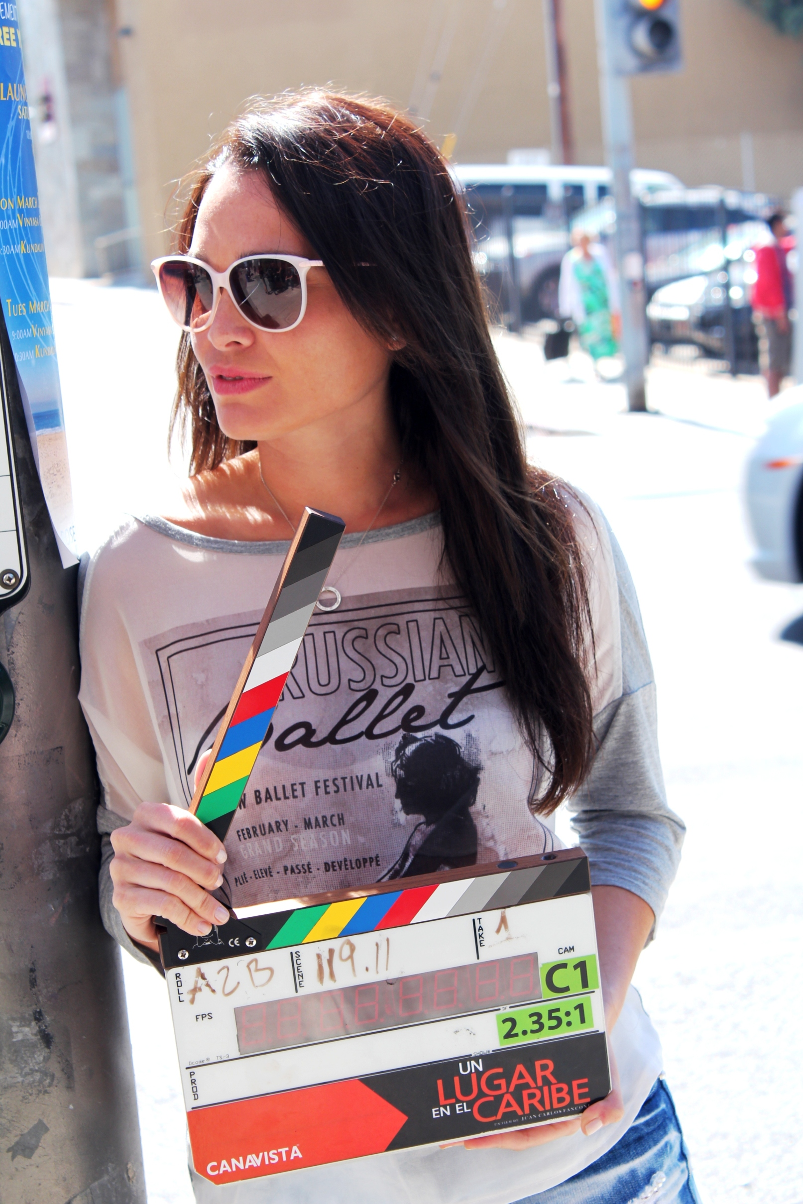 La actriz paraguaya Lali Gonzalez en el set de la pelicula "Un lugar en el Caribe". Año 2015.